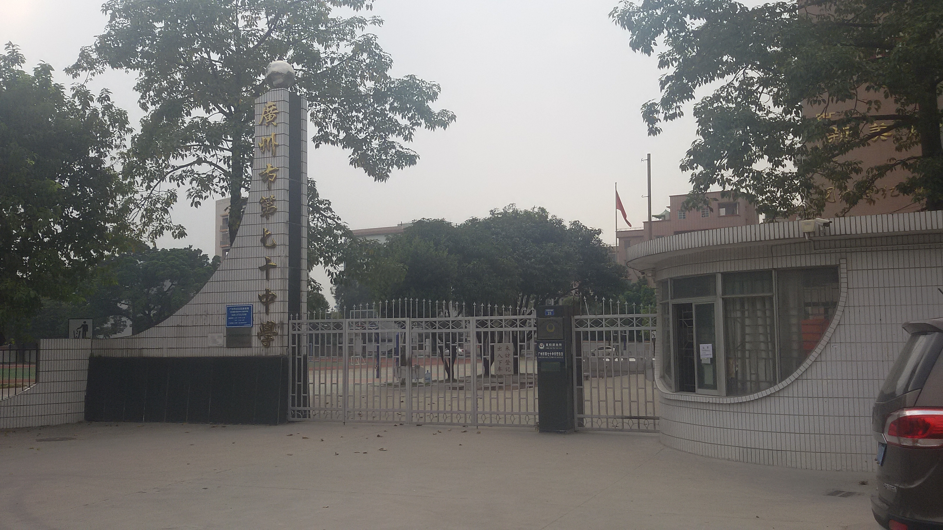 粵語: 广州市第70中学嘅大门